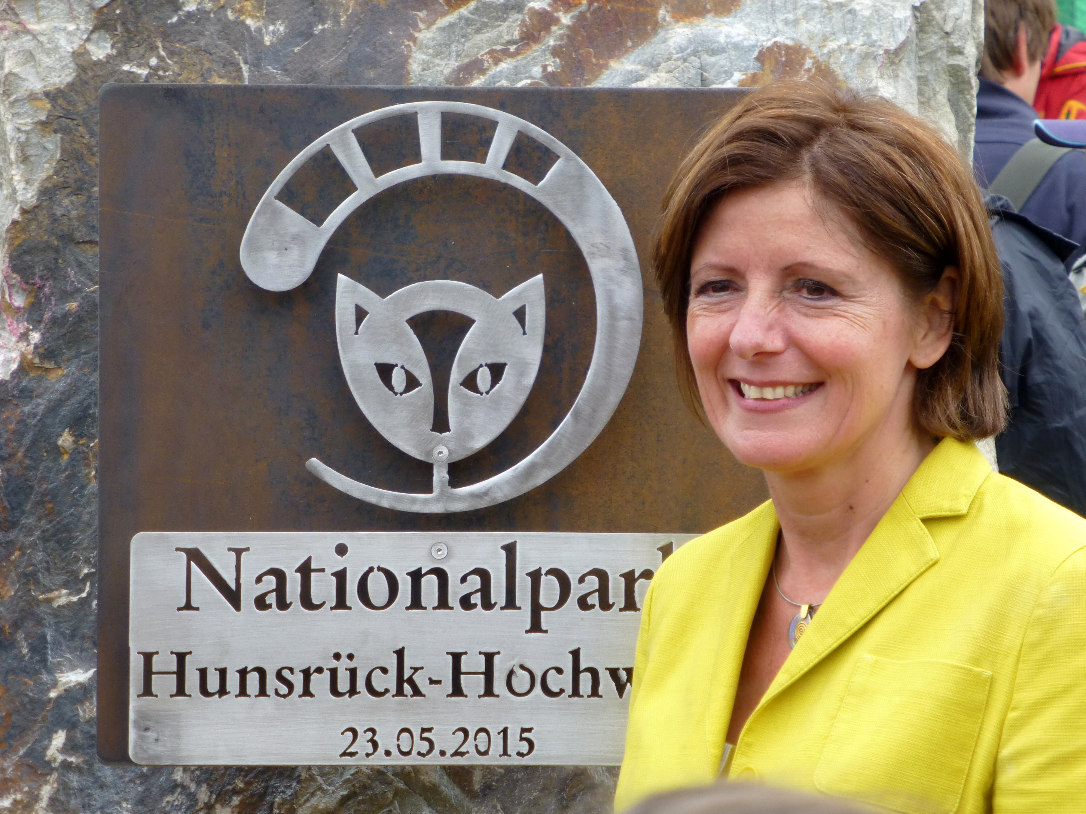 Veranstaltung zur Eröffnung des Nationalparks Hunsrück-Hochwald: Malu Dreyer